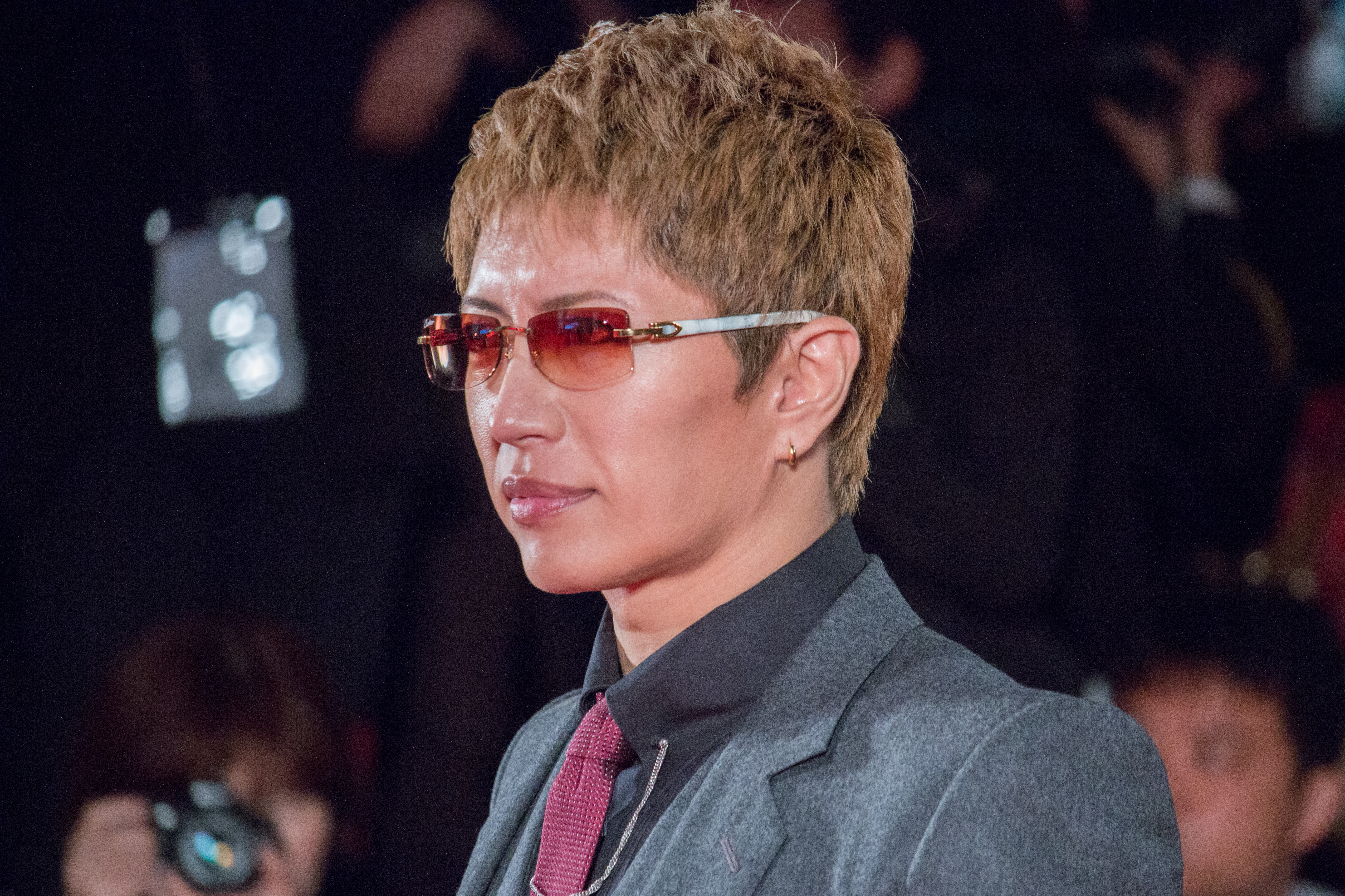 第28回 東京国際映画祭 オープニングセレモニー Gackt (ガンダムとその世界)